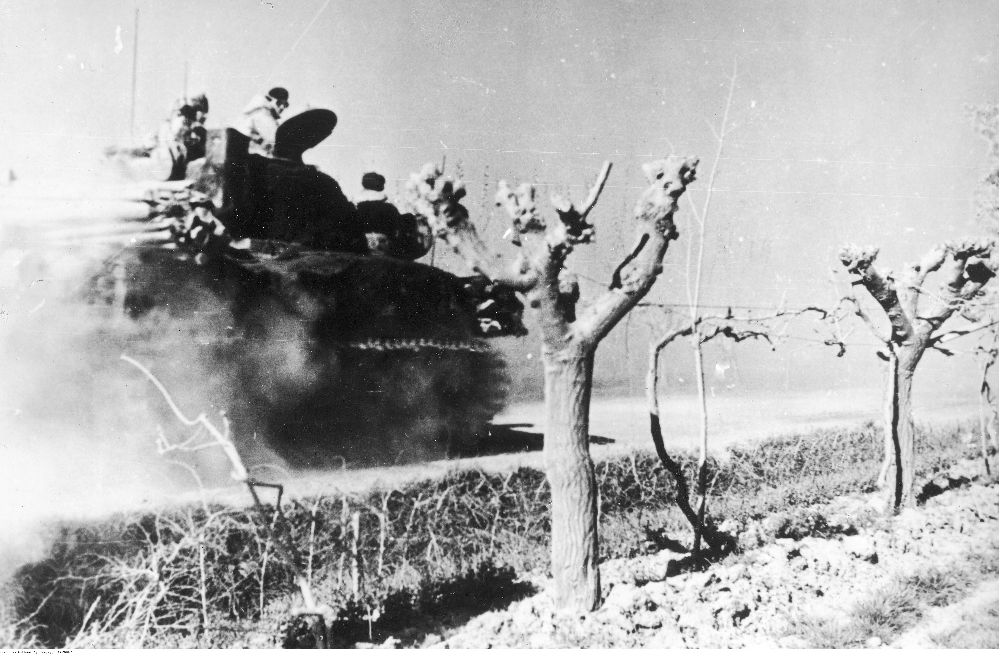 Forsowanie rzeki Senio przez żołnierzy 2 Korpusu Polskiego podczas bitwy o Bolonię. Czołgi M4 Sherman z 4 Pułku Pancernego "Skorpion" udają się do akcji nad rzeką Senio. Archiwum Fotograficzne Tadeusza Szumańskiego. Sygnatura: 24-508-5